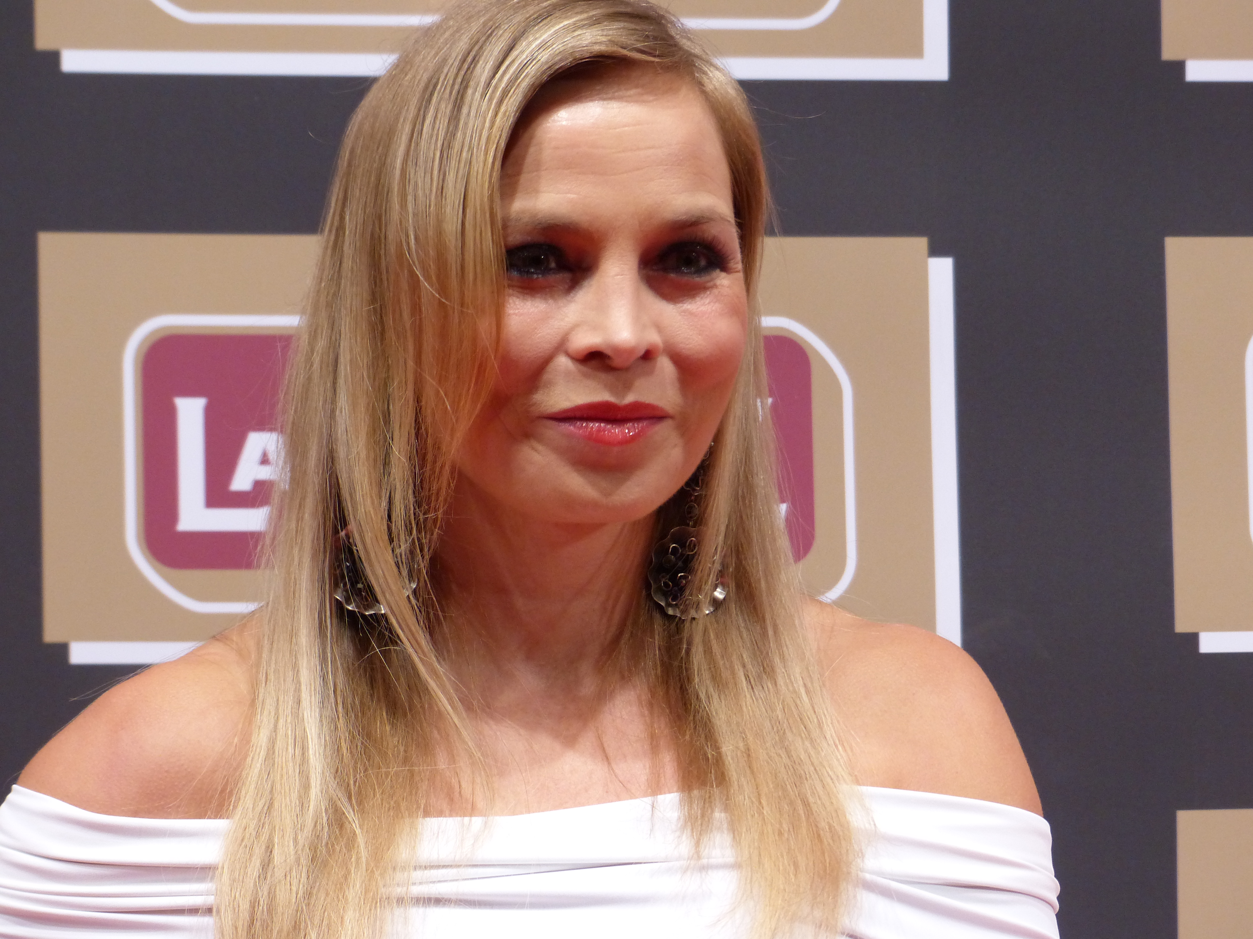 Regina Halmich bei der Lambertz Monday Night, im Februar 2016.